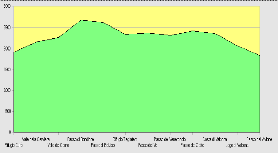 Altimetria del Sentiero naturalistico Antonio Curò.